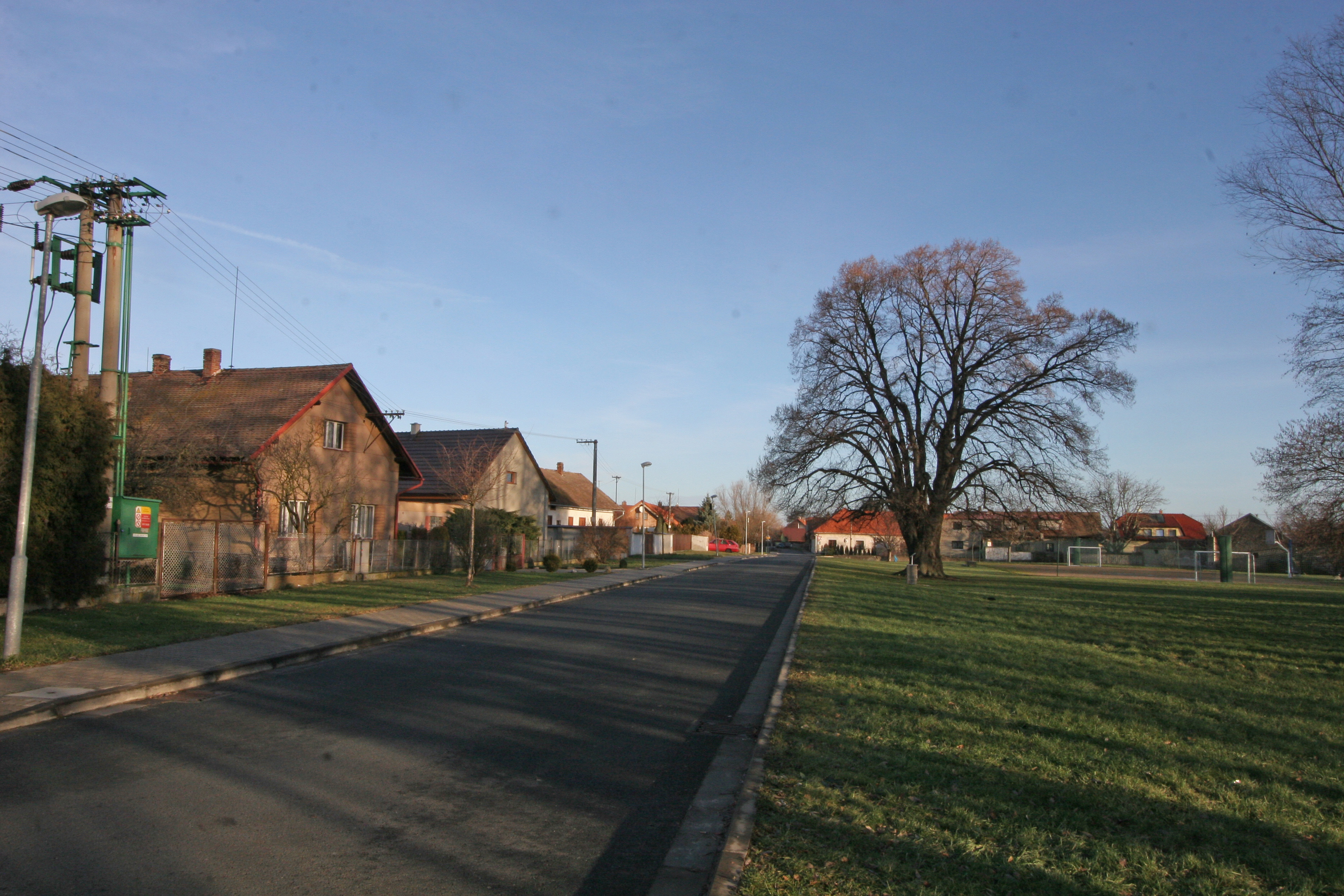 Dubany náves